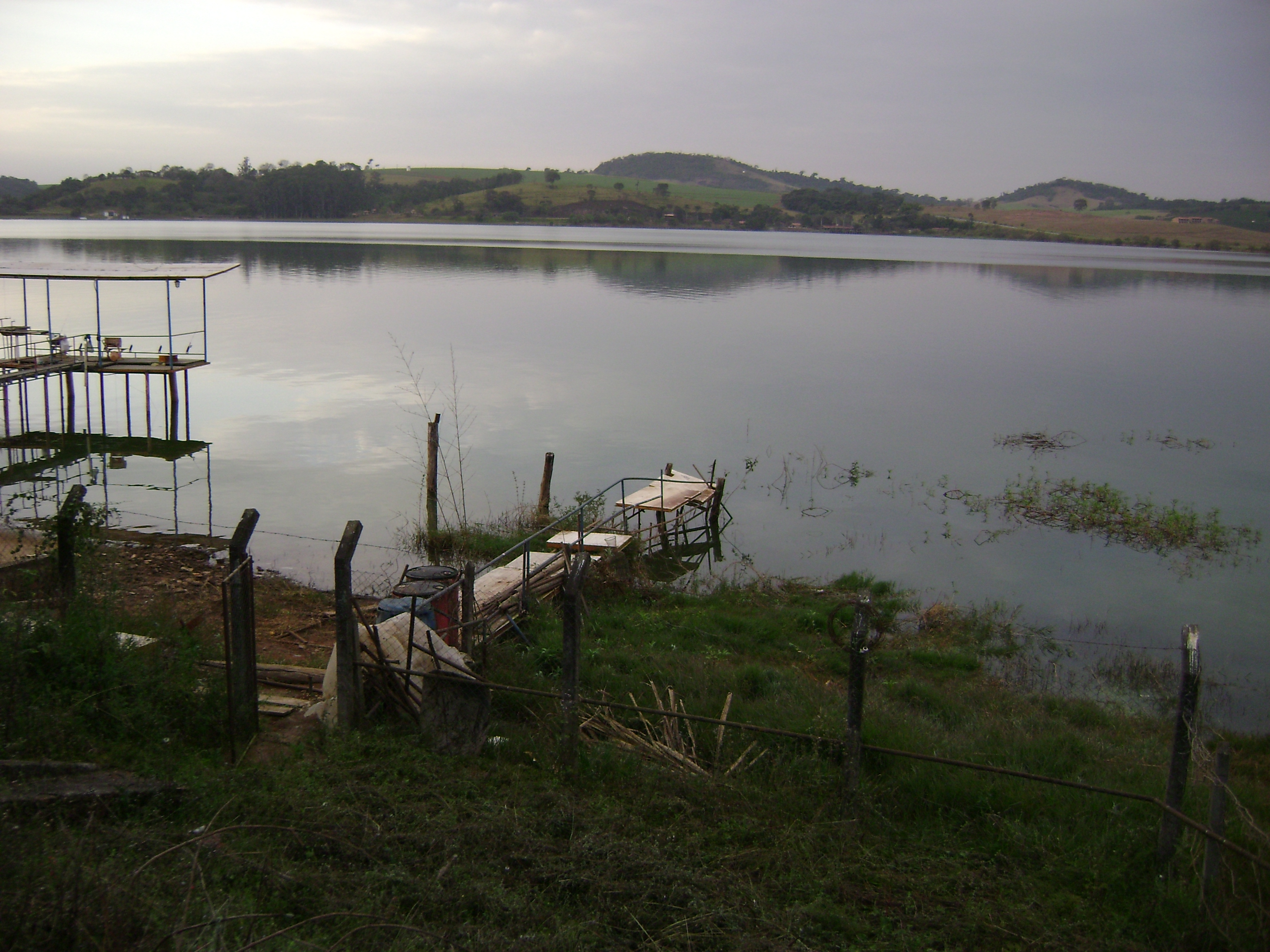 Areado - MG